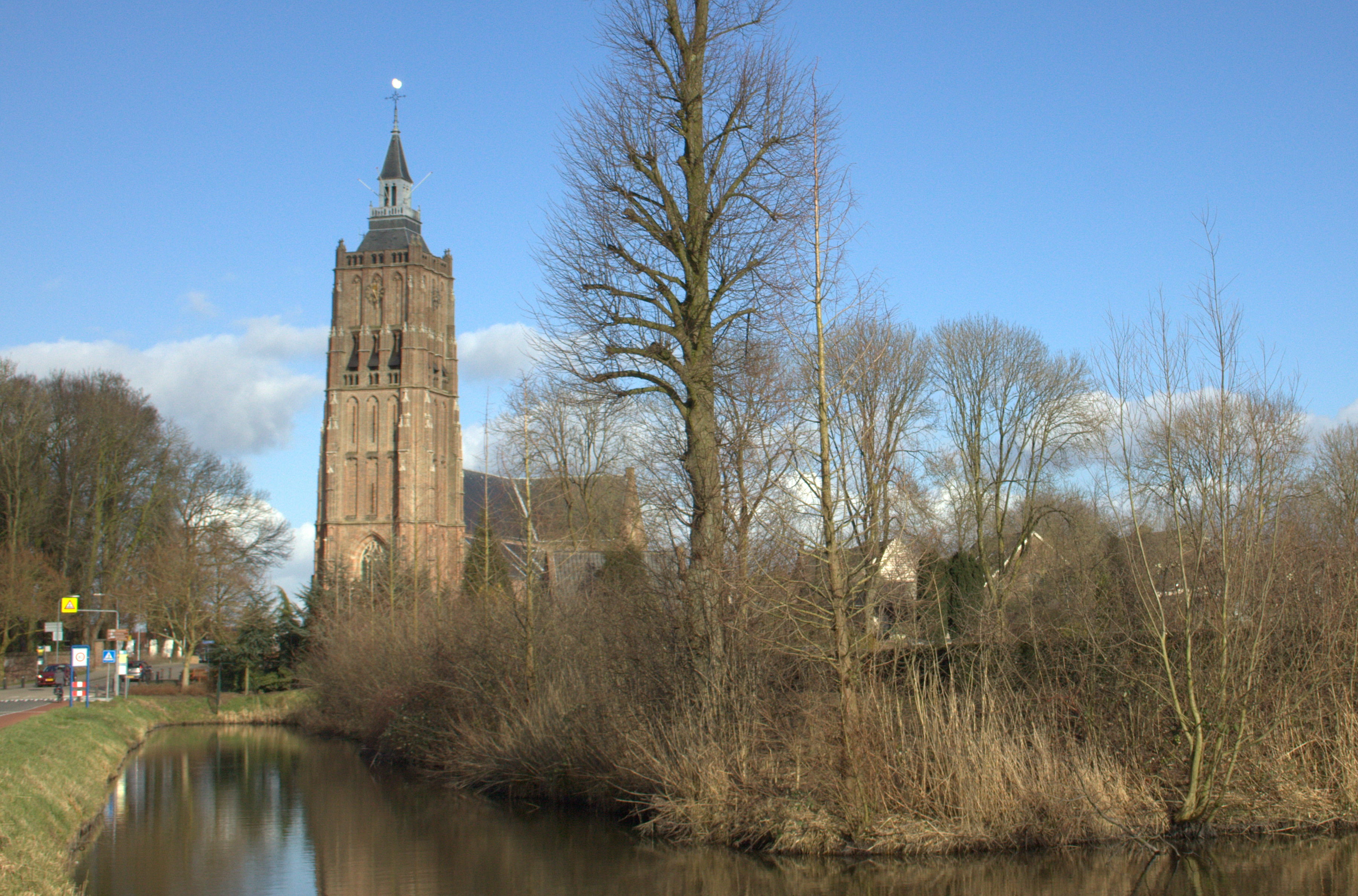 Zicht op de Nederlands Hervormde kerk in Asperen.